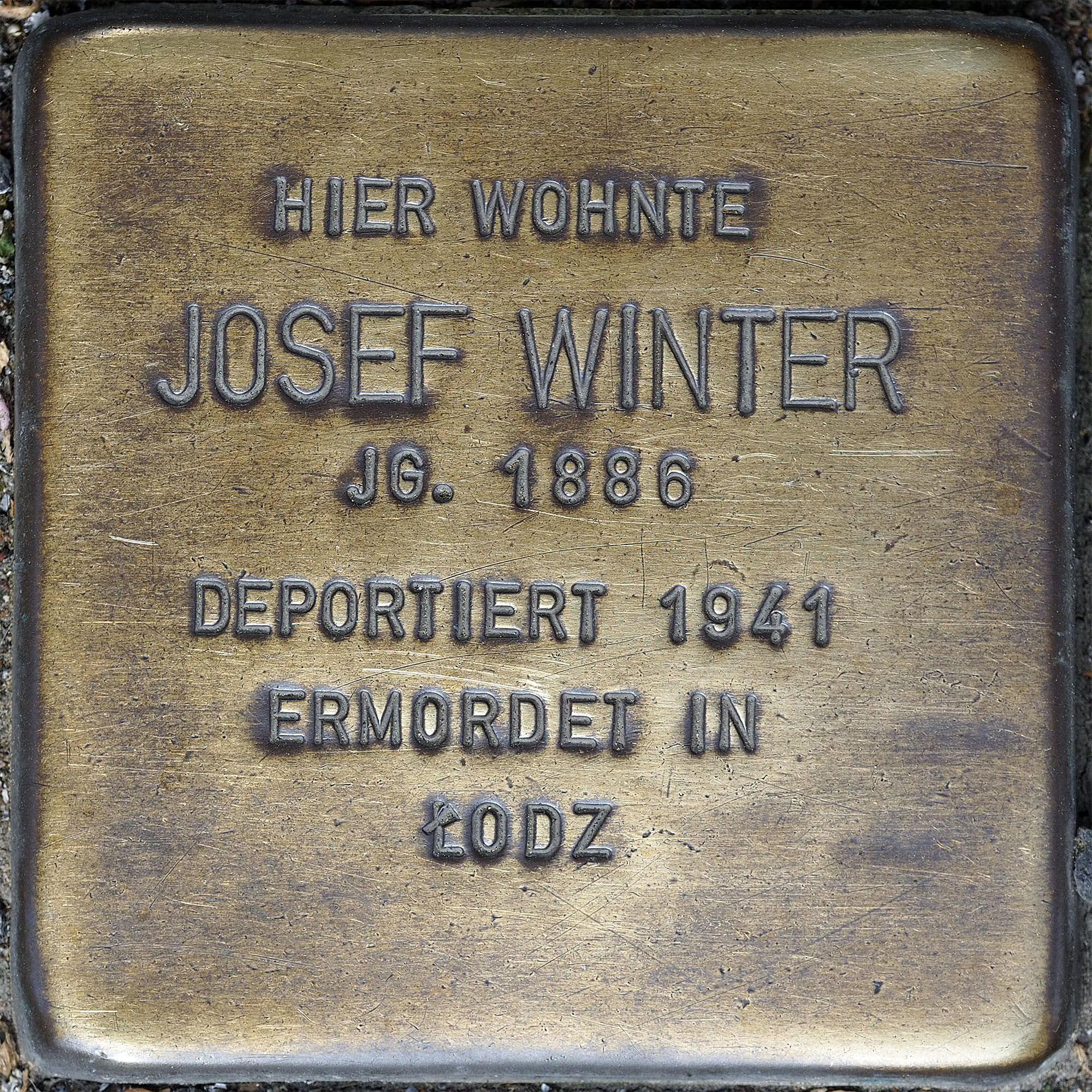 Stolpersteine MG: Winter, Josef